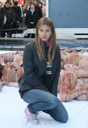 Kloosterboer en una protesta contra el maltrato a los animales.